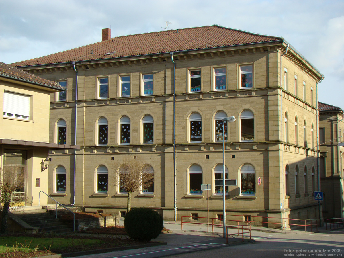 Historisches Gebäude Kaiserstr. 4 in Eppingen